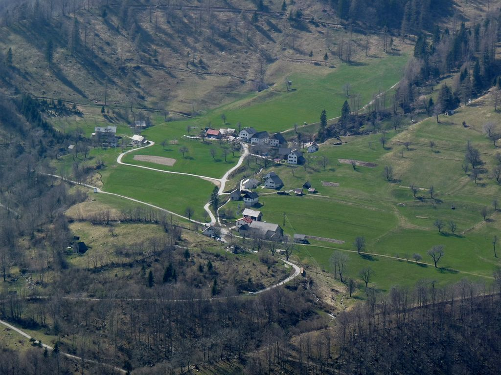 Tolminske Ravne.